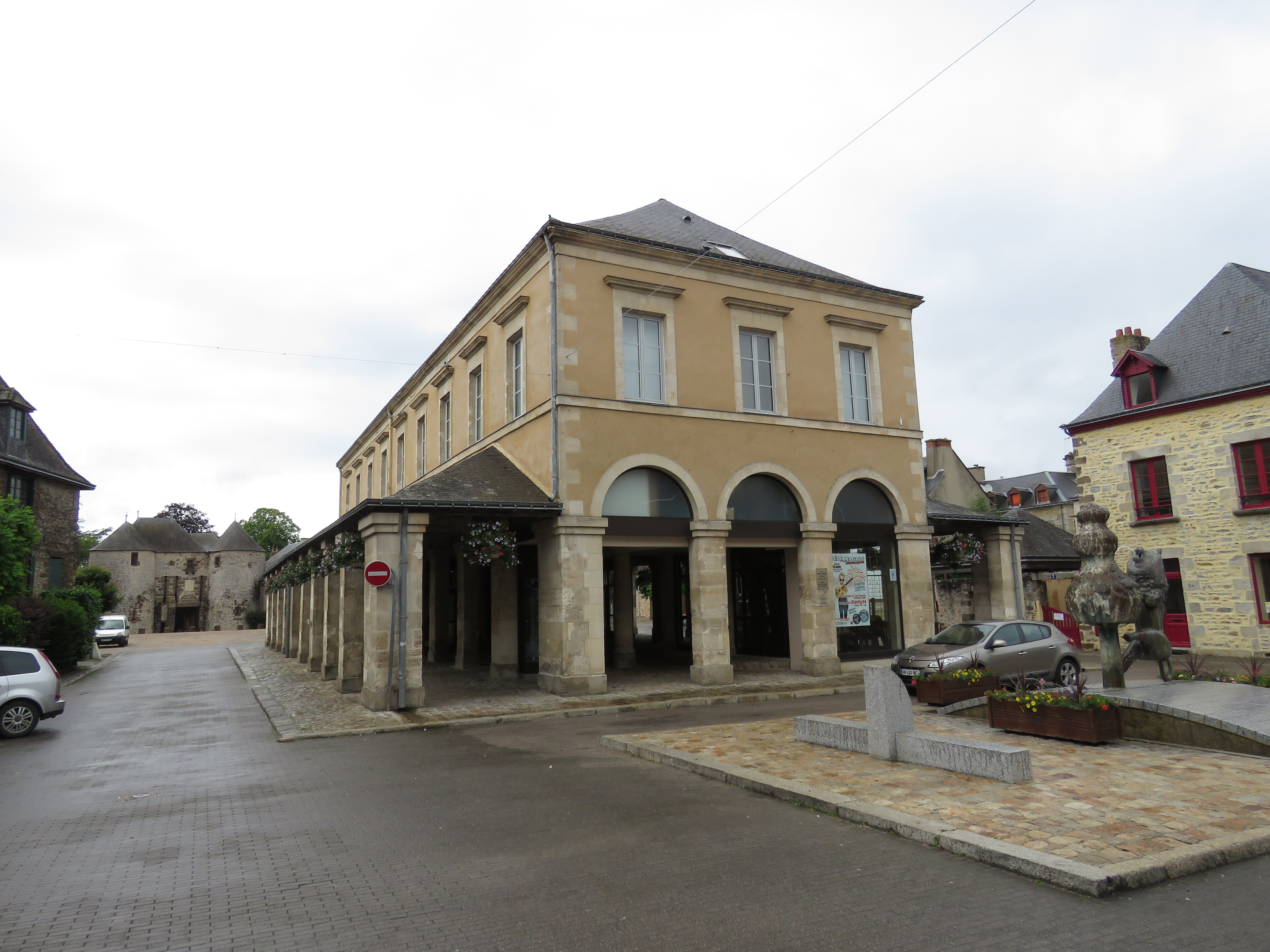 Halles